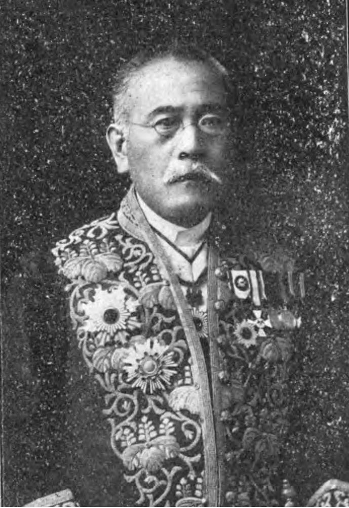 小松原英太郎肖像。慶應義塾卒業。枢密顧問官、貴族院勅選議員、文部大臣、農商務大臣。